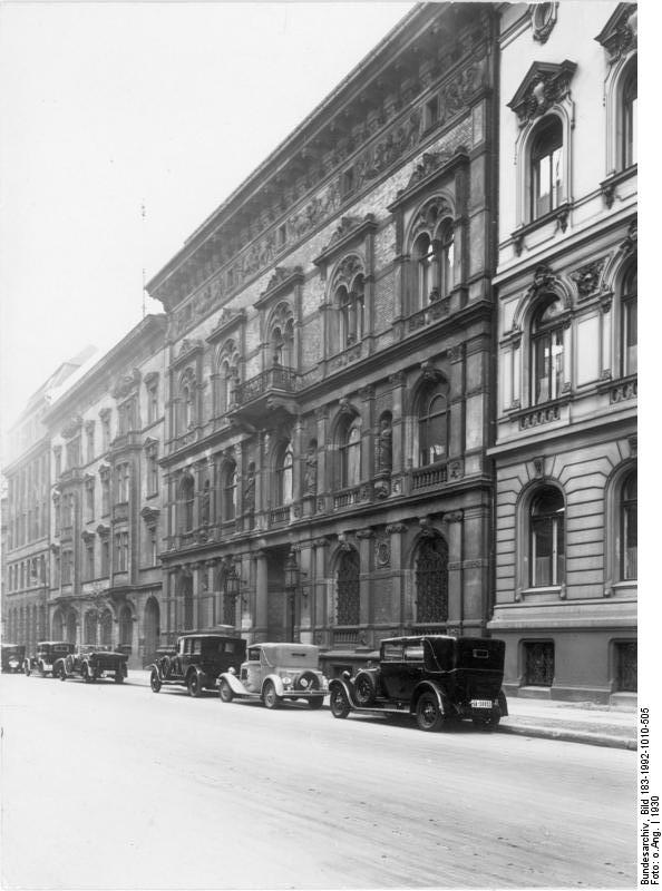 Bankgeschäft Krause & Co., Behrenstraße 2, wird aufgelöst